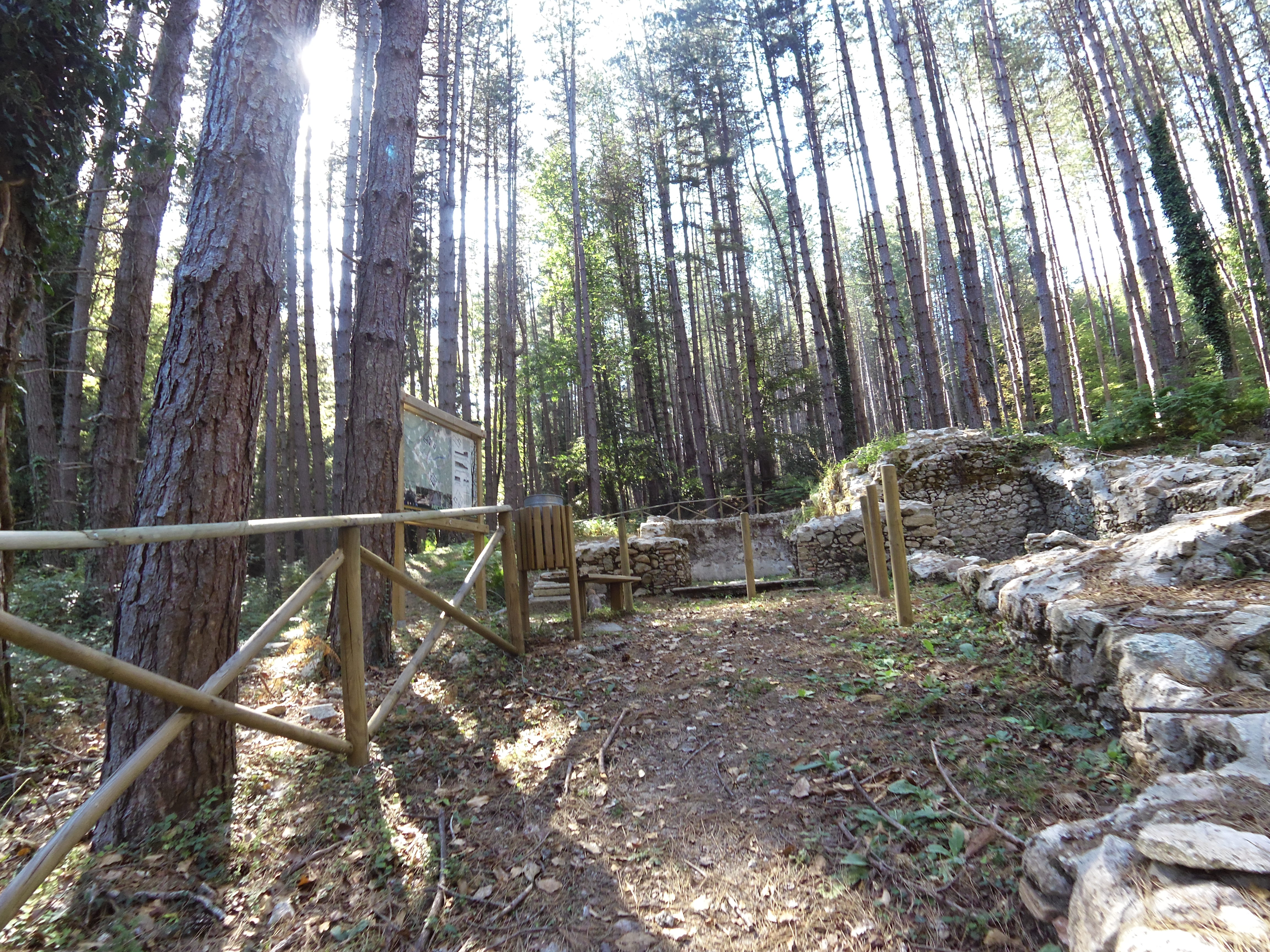 Parco siderurgico di Chiesa Vecchia (Ferdinandea) Agosto 2017 Chiesa e Palazzo amministrativo